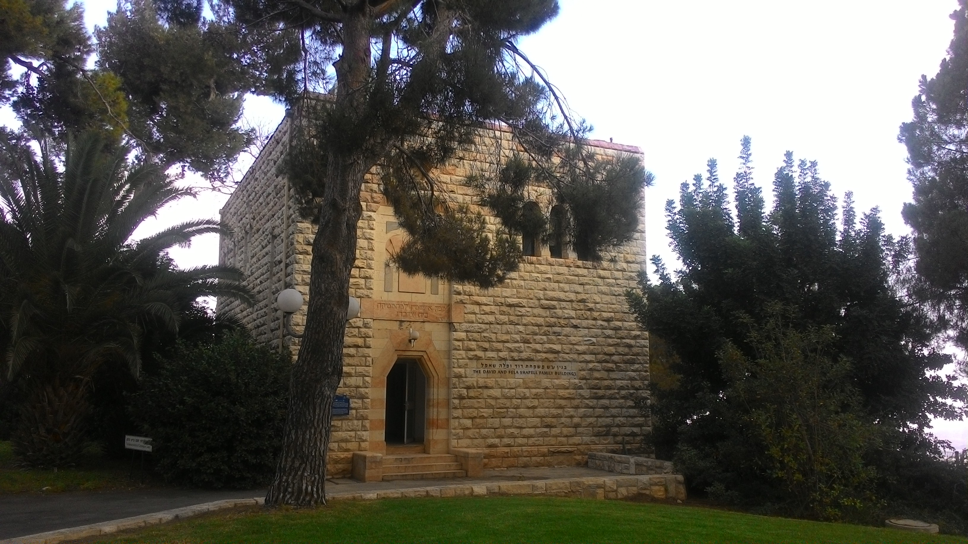 הבניין ההיסטורי של מכון איינשטיין למתמטיקה בהר הצופים